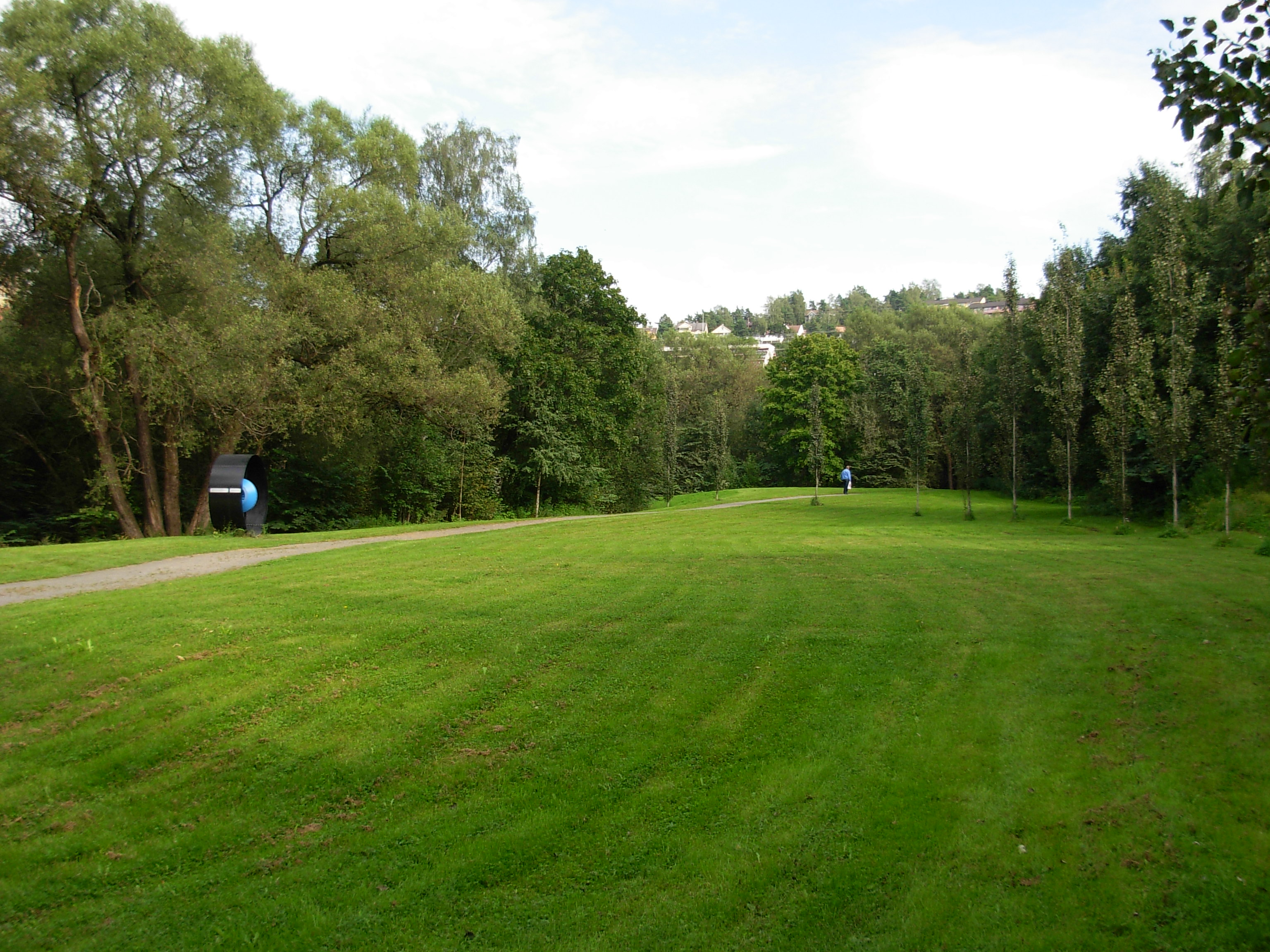 Svartdalsparken, Kværner, Oslo